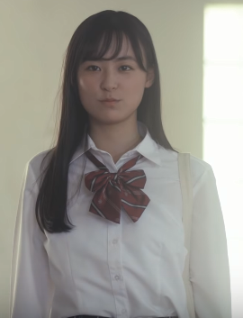 鈴木美羽です。